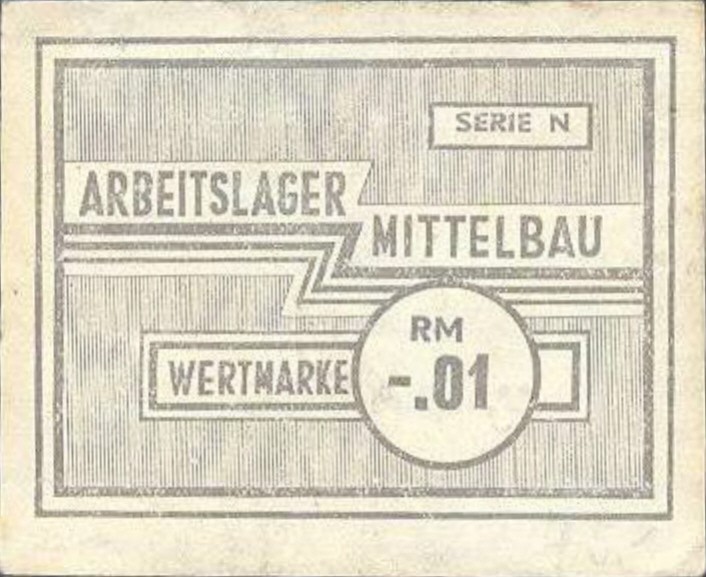 1 Reichspfennig Wertmarke